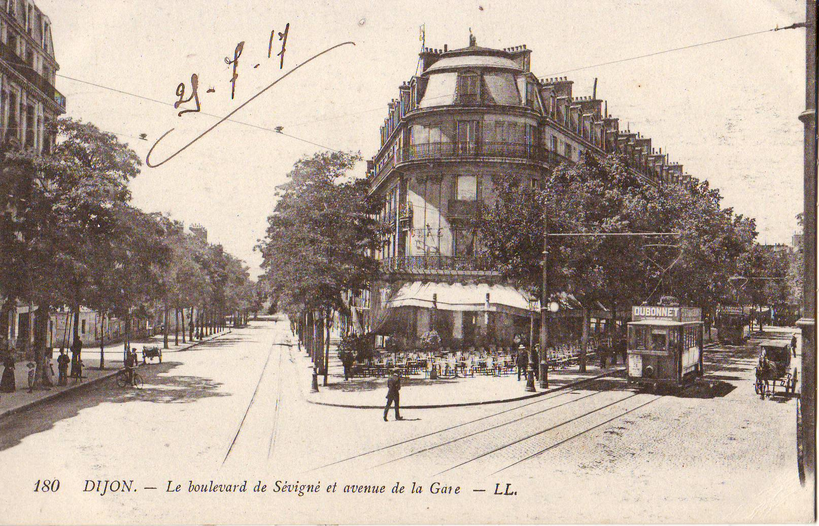 Carte postale ancienne éditée par LL, n°180 : DIJON - Le Boulevard de Sévigné et avenue de la Gare